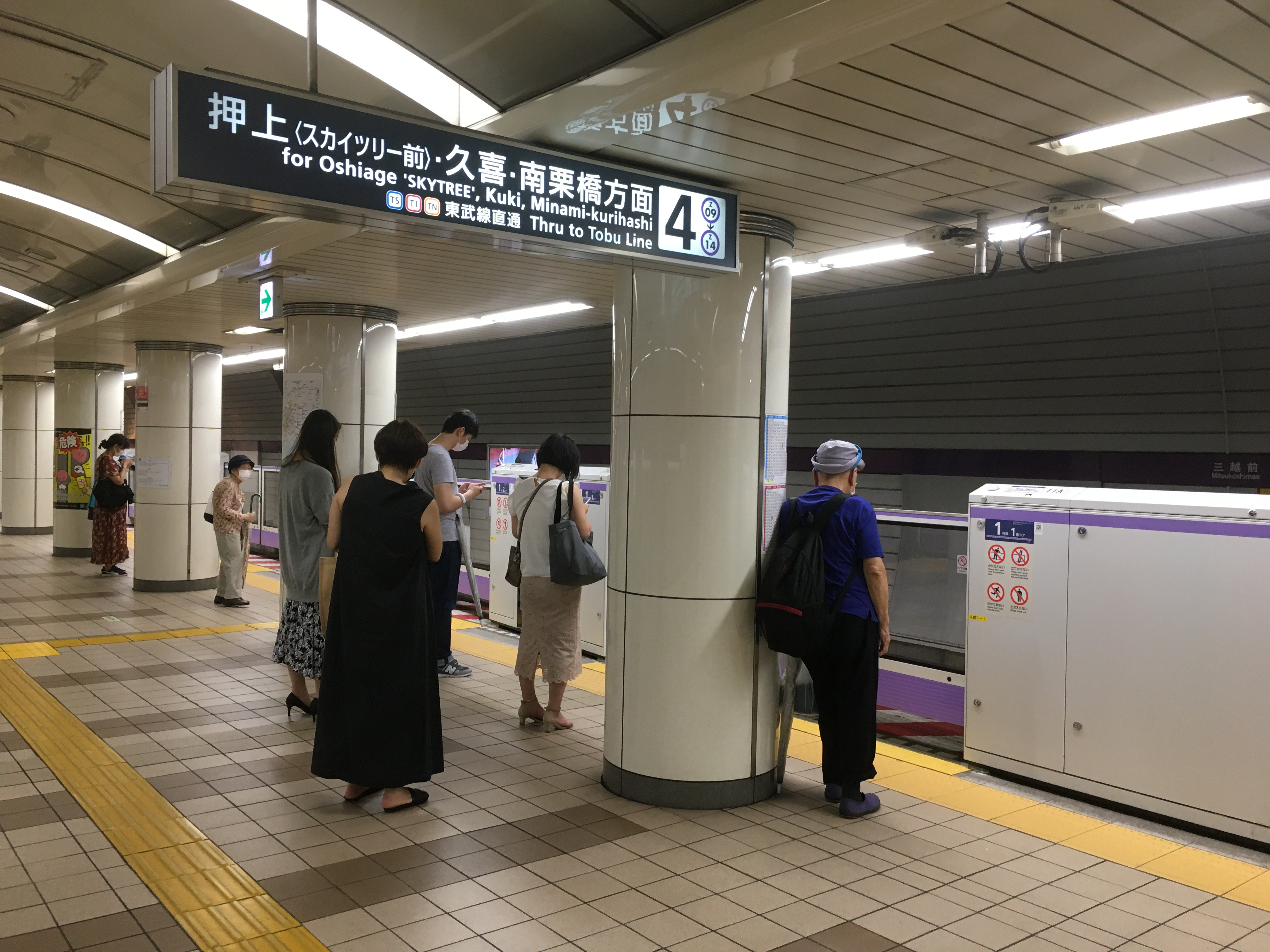 三越前駅の半蔵門線ホーム (Mitsukoshimae Station, Hanzomon line platforms)